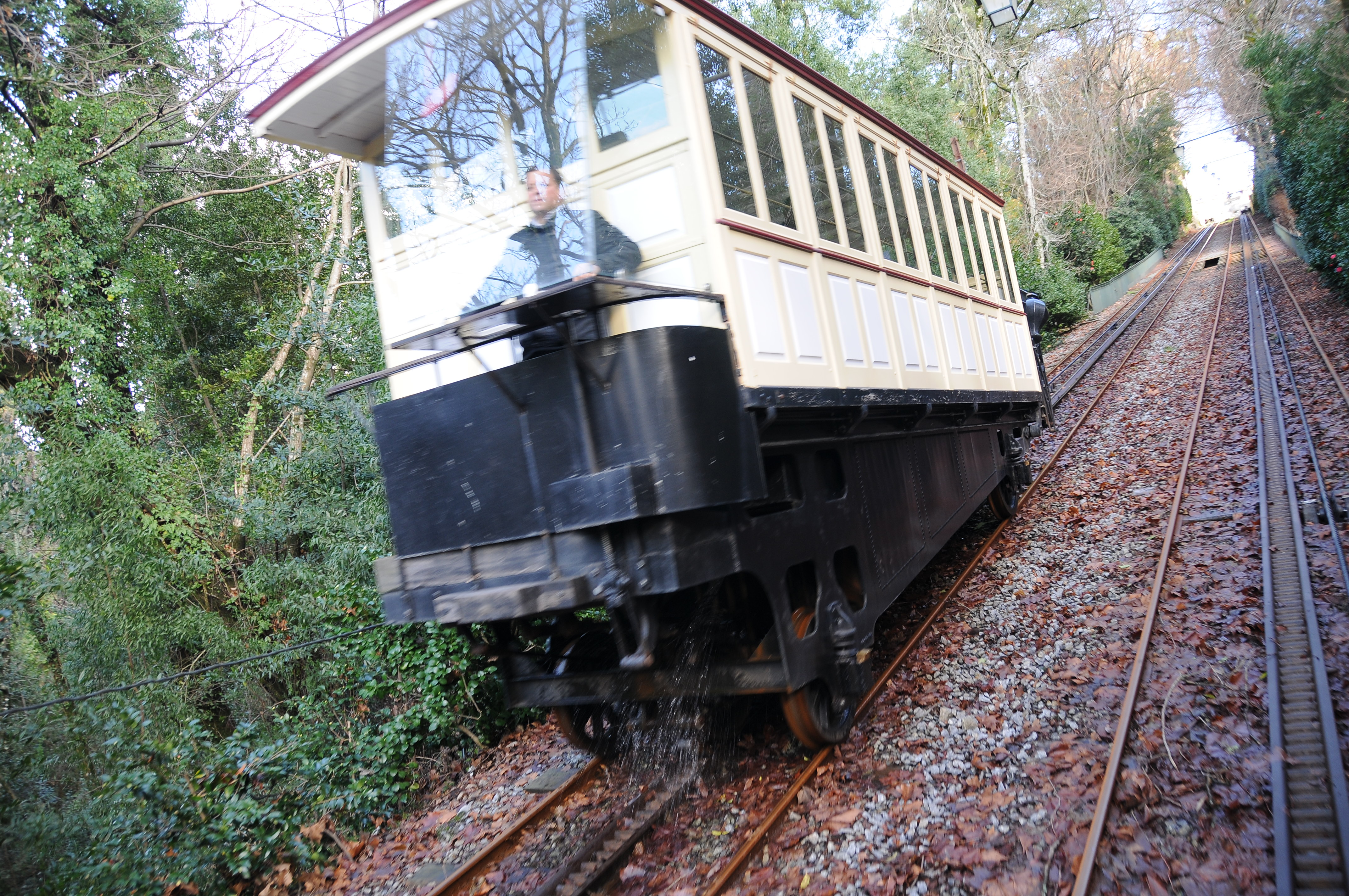 Bom Jesus, in Braga, Portugal.